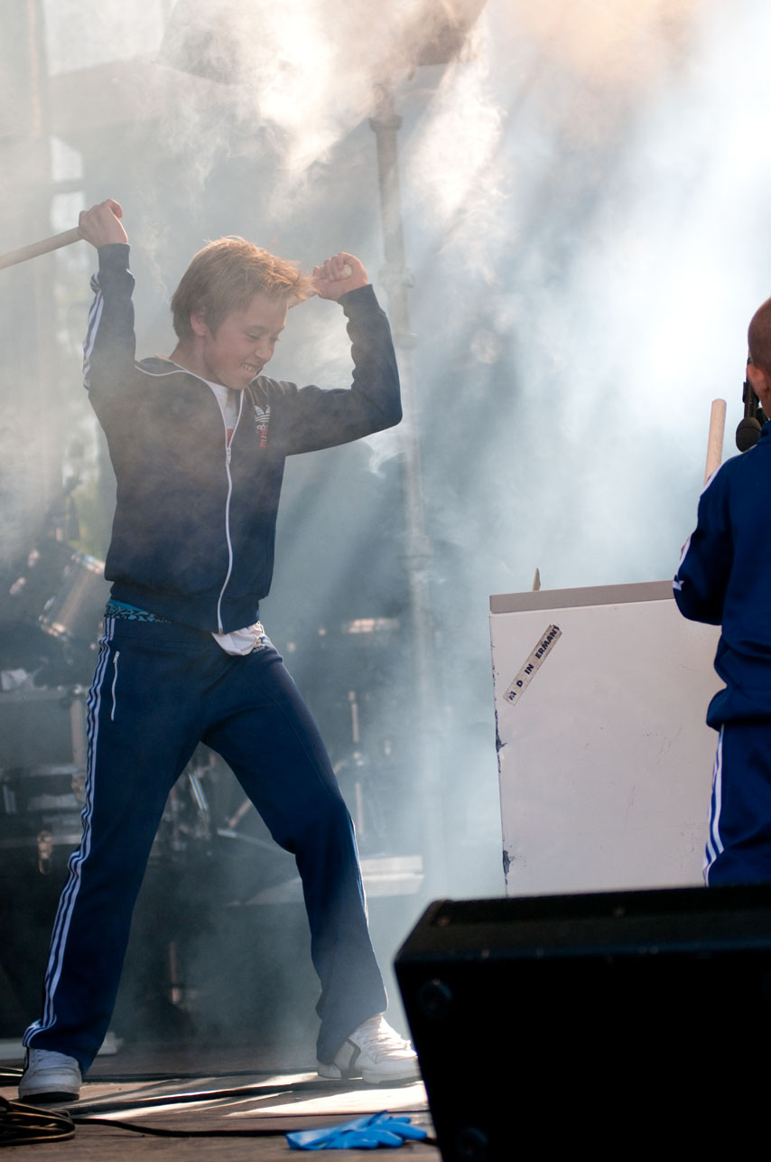 Hurra Torpedo spilte på MiniØya 2010 og fikk god hjelp av flere barn på scenen.